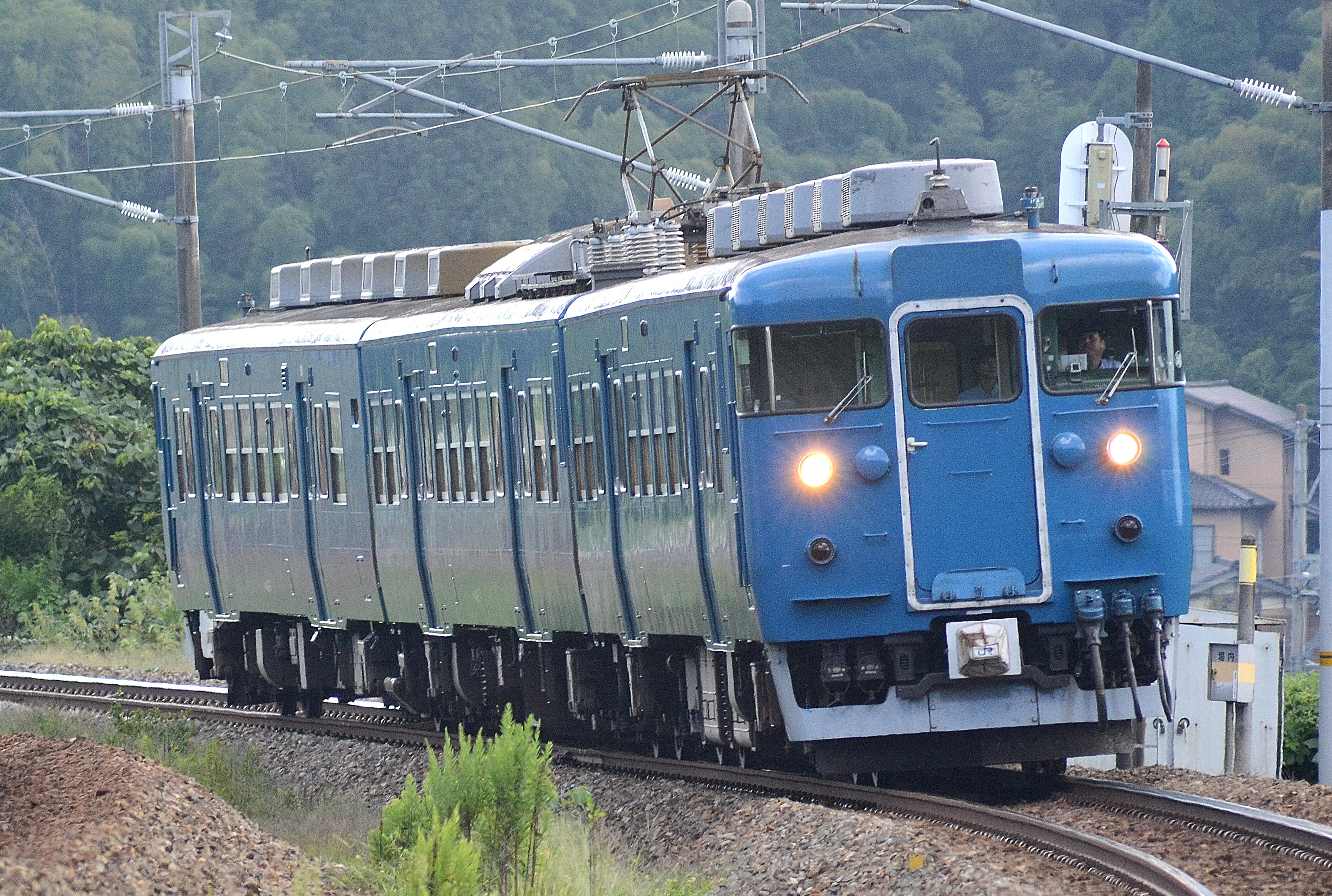 北陸本線、倶利伽羅峠駅付近を走行する、青色一色への塗装変更を施工された413系交直流電車（公道から撮影）